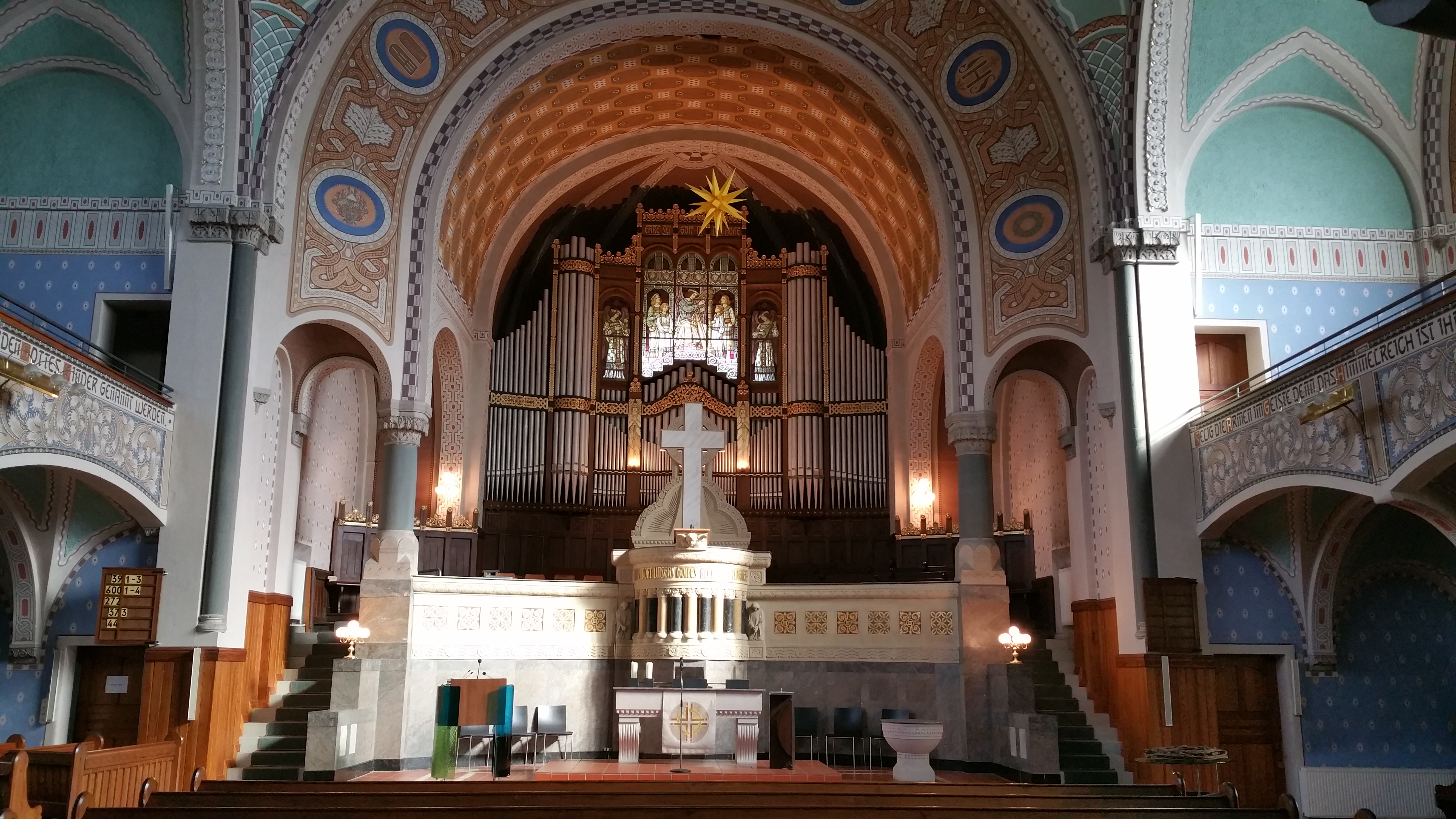 Innenraum mit Blick auf die Anordnung von Altar, Kanzel, Kanzelkreuz und Orgel, evangelische Immanuel-Kirche Dortmund Marten